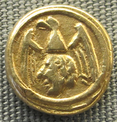 Messina (forse), 4 tari di manfredi, 1258-1266